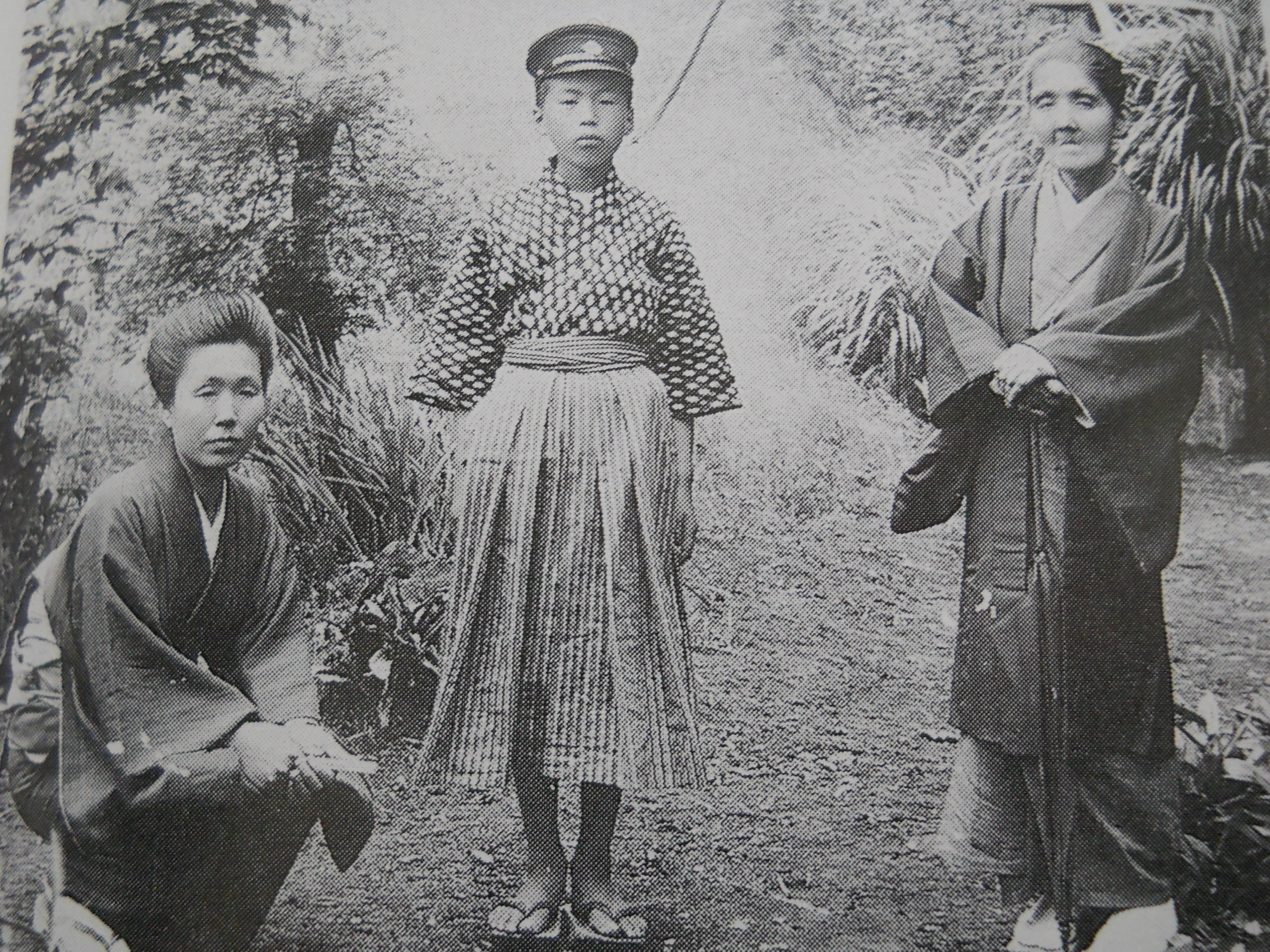 Masaoka Family